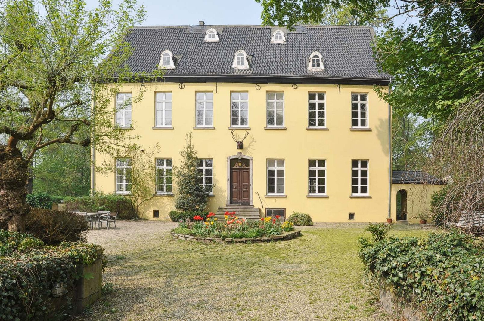 Haus Traar, 2009, Herrenhaus